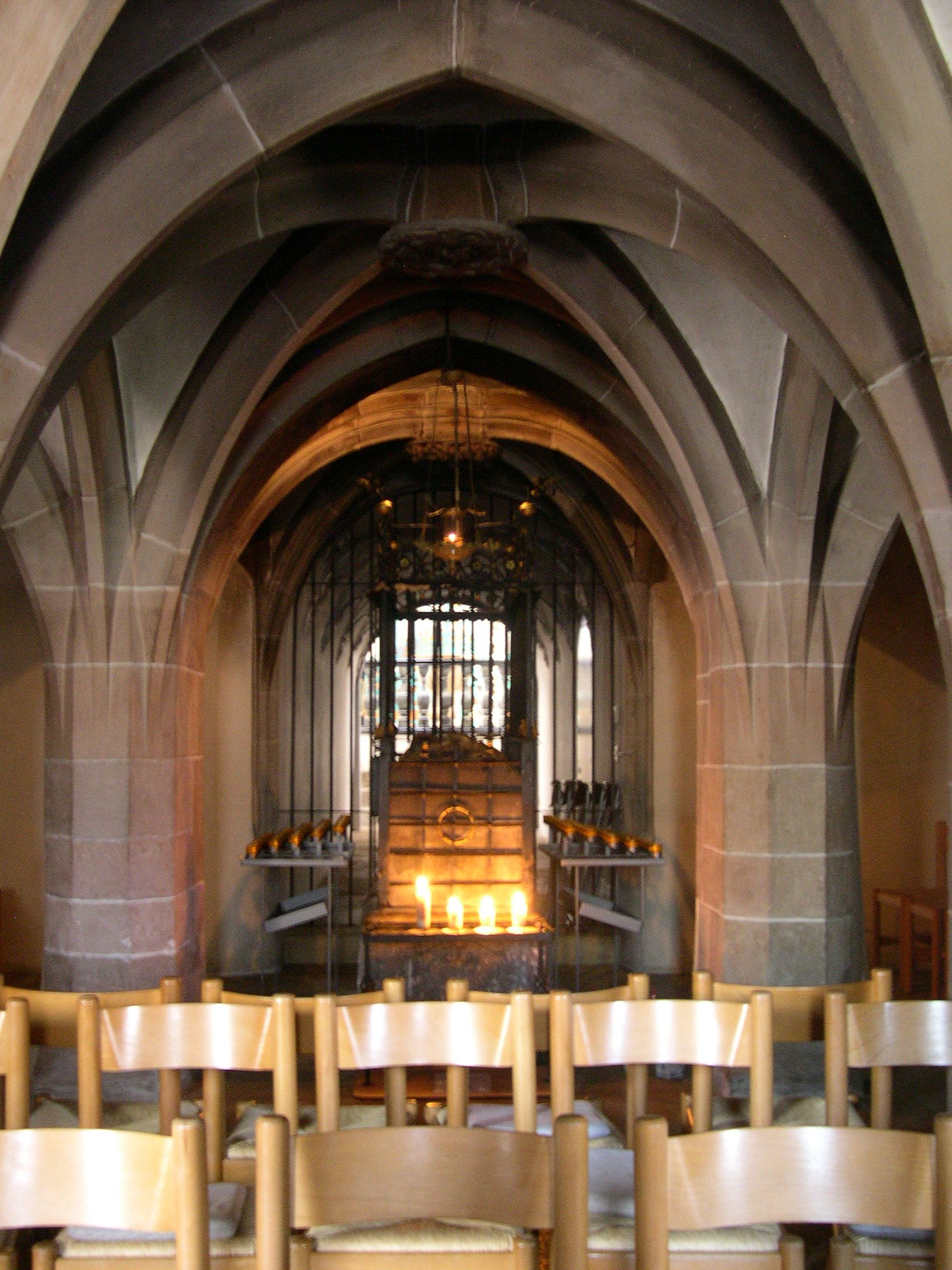 Kryptha der Heiligen Verena im Münster, Zurzach